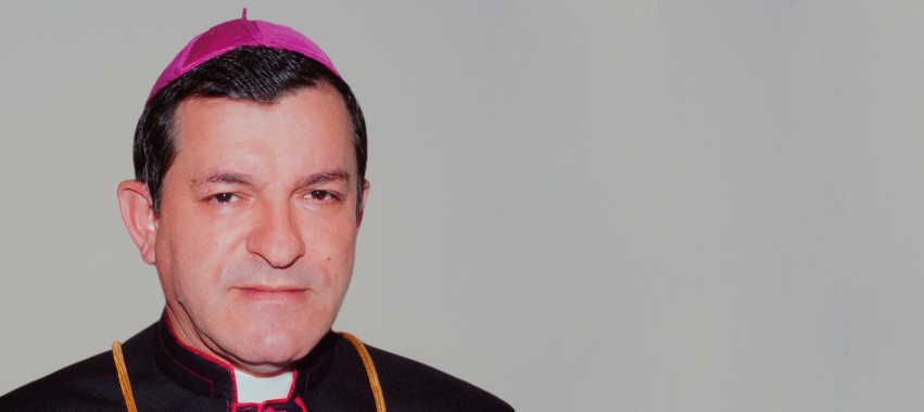 Arzobispo de Nueva Pamplona